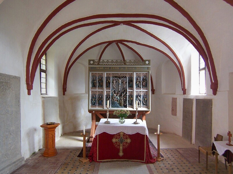 Kirche in Weitendorf, Landkreis Güstrow